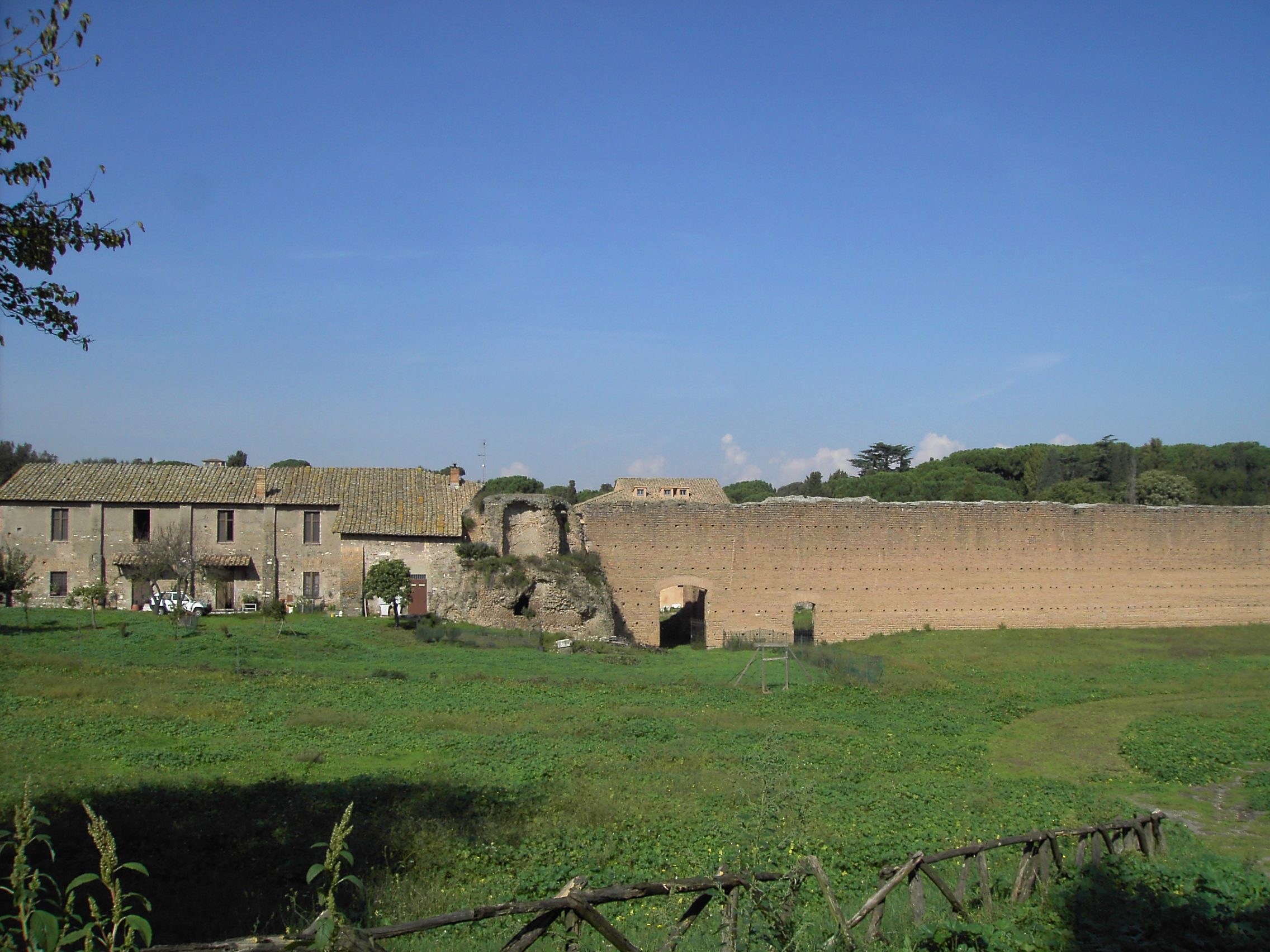 Roma, via Appia Antica, villa di Massenzio: da sinistra, casale Torlonia, ninfeo giulio-claudio, muro del quadriportico del mausoleo di Romolo.